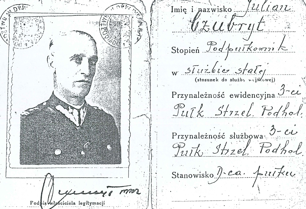 Legitymacja osobista dowódcy 3 pspodh. str. 2